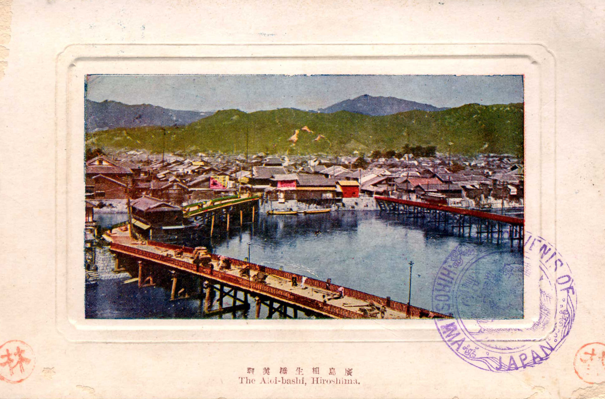 木橋時代の相生橋